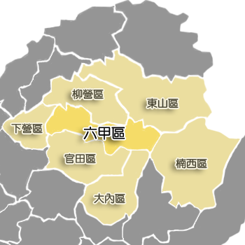 六甲區相對位置